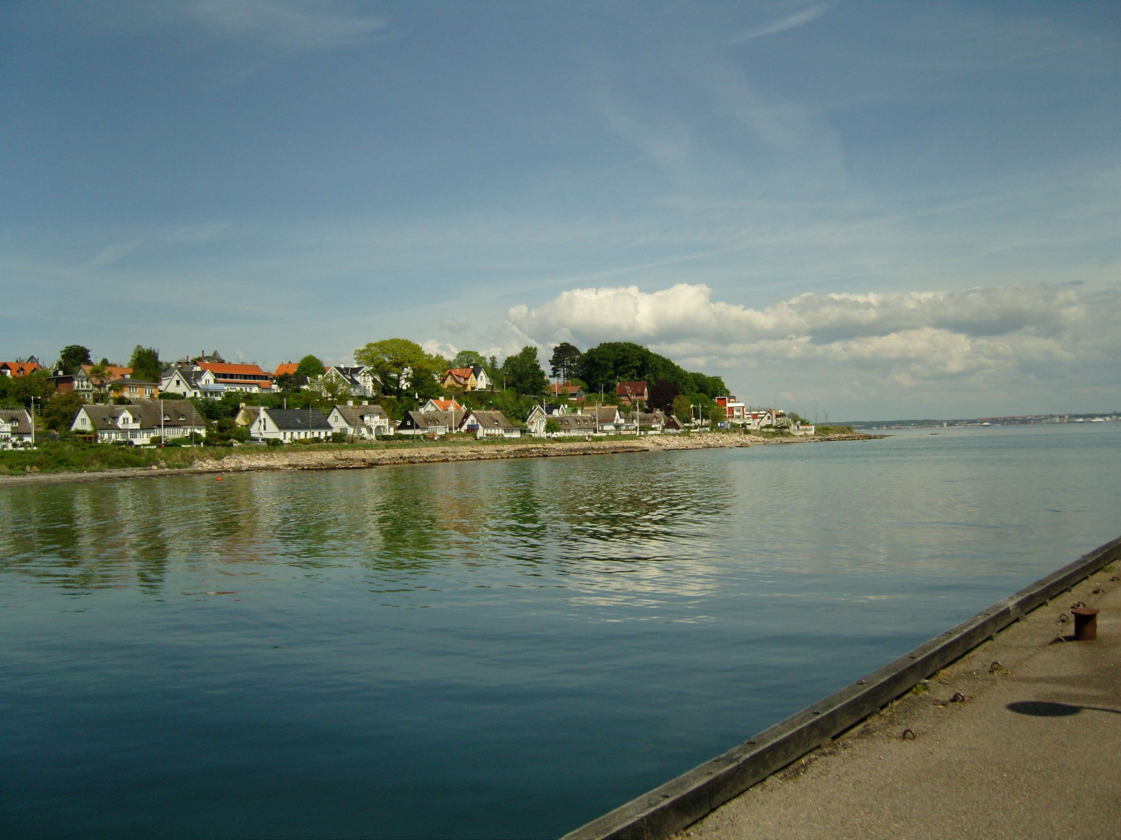 Snekkersten in southern Helsingør, Denmark